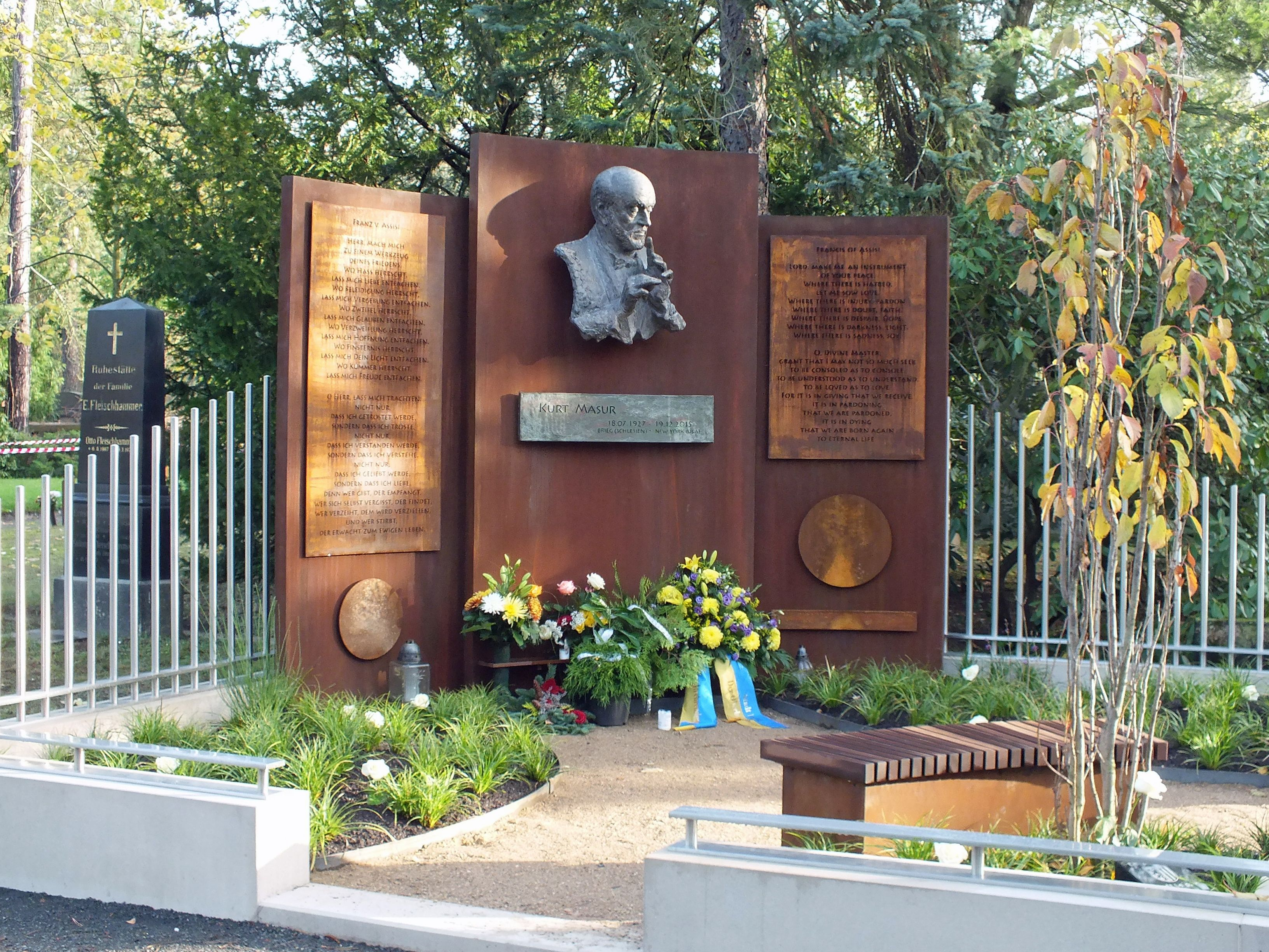 Das Ehrengrab für Kurt Masur auf dem Leipziger Südfriedhof. Gestaltung Markus Gläser